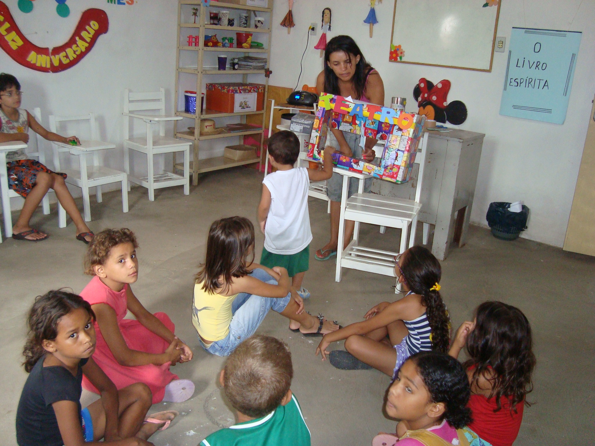 Classe d'initiation au spiritisme pour les enfants. Centre spirite de Boa Ventura, état de Paraiba, Brésil, 2010.